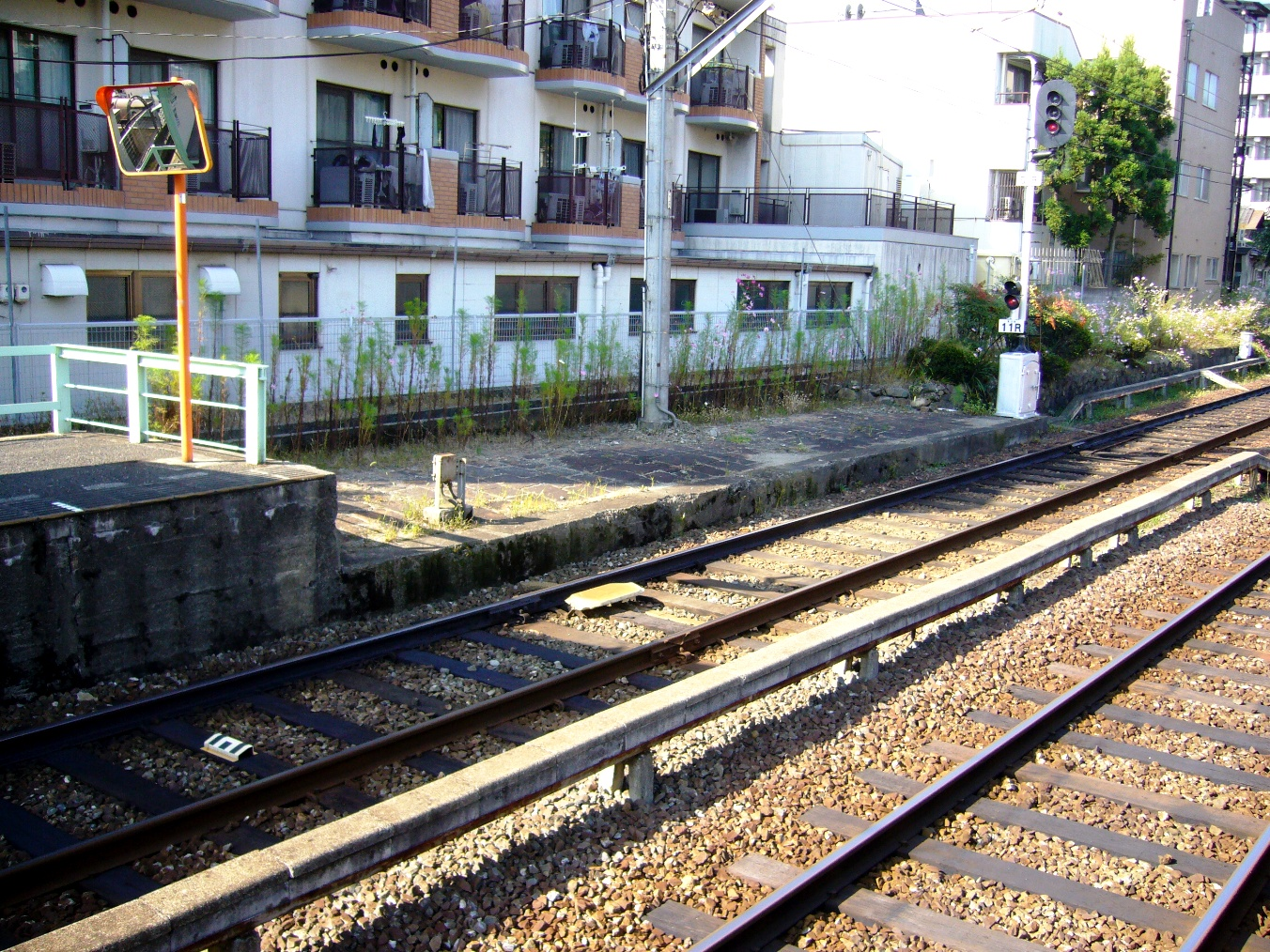 京都市左京区にある叡山電鉄叡山本線及び鞍馬線の宝ヶ池駅の4番ホームの端に残る低床ホームの跡。元田中駅からかつて乗り入れていた京都市電の車両のためのものという。2008年10月19日に投稿者が撮影。